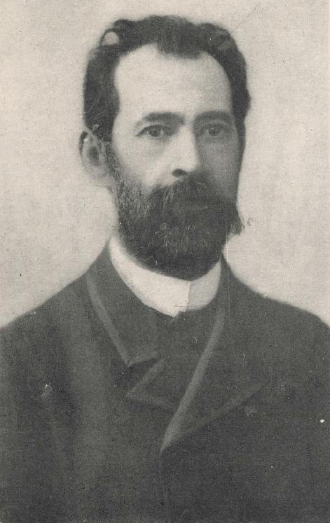 Luis Rodriguez Velasco (Santiago, 9 de diciembre de 1838 - ibídem, 14 de enero de 1919) Fue un político, poeta y periodista chileno.